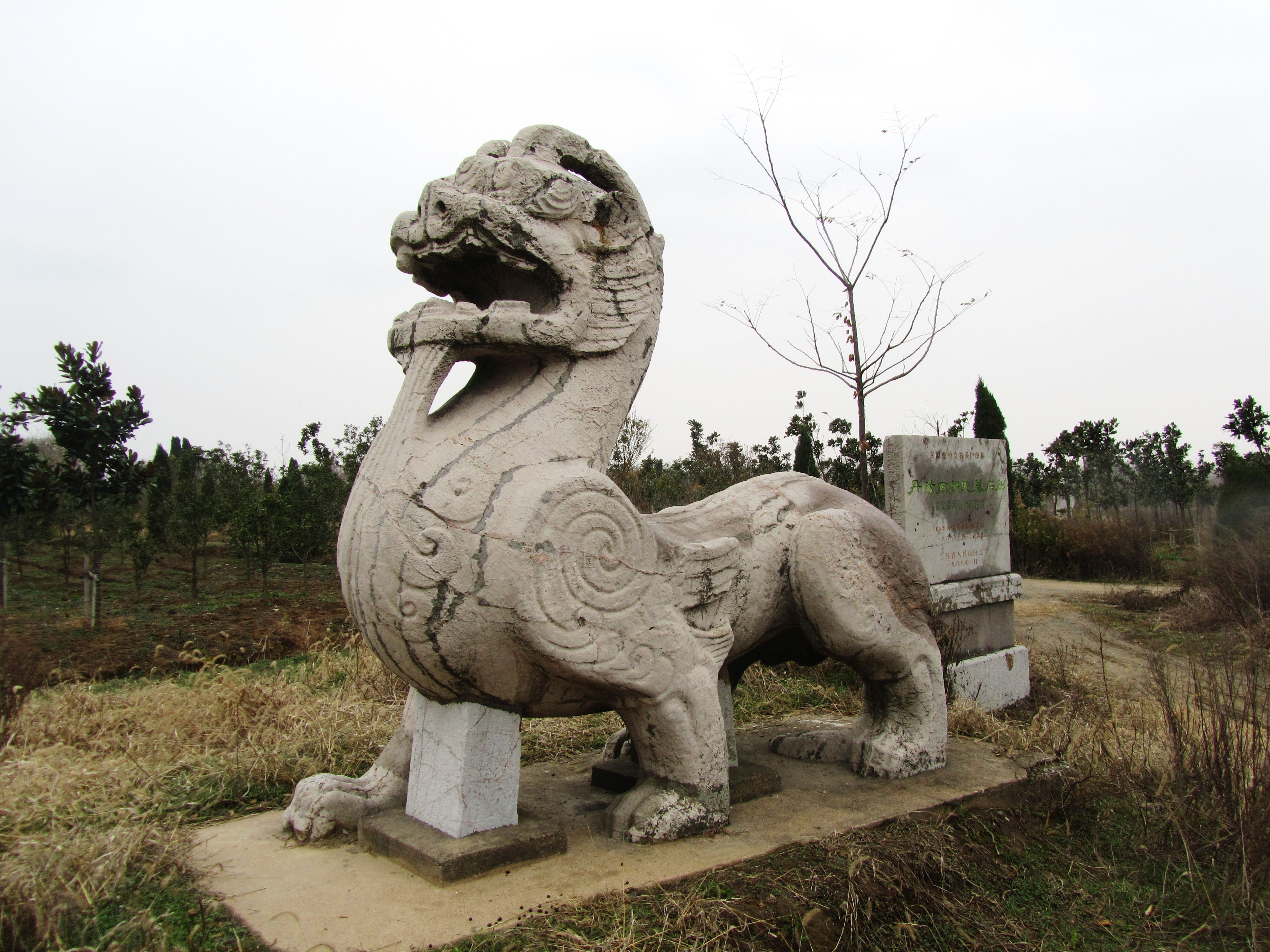 丹阳南朝陵墓石刻，梁武帝萧衍修陵前天禄。